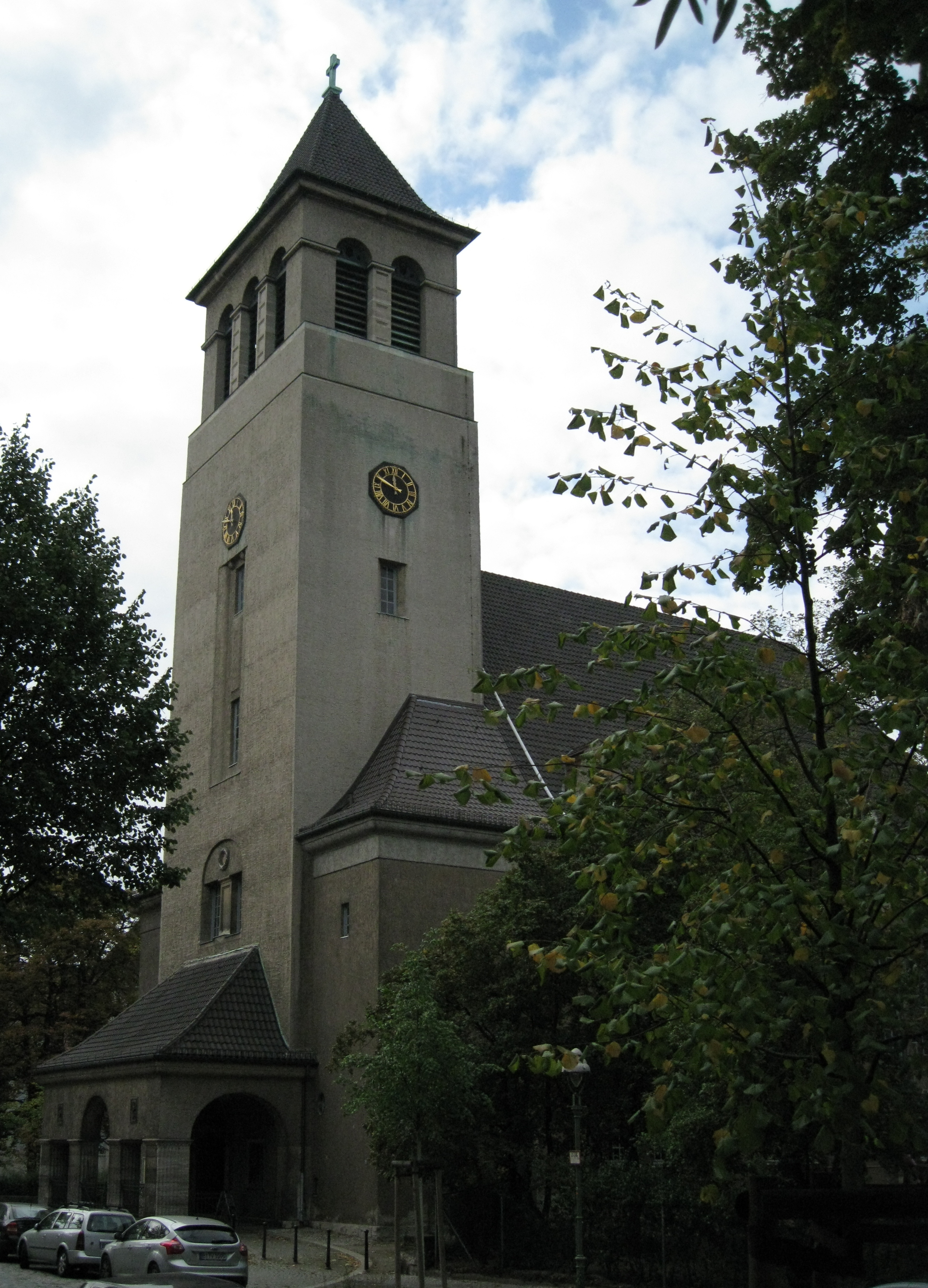 Turm mit Eingangsvorhalle der Glaubenskirche Berlin-Tempelhof